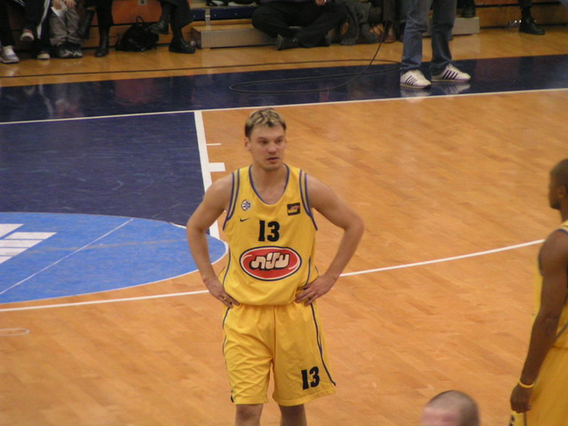 שאראס